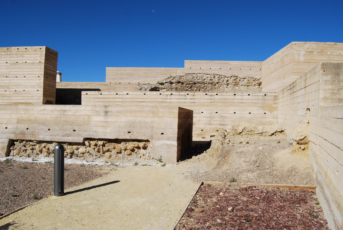 Vista de la puerta triacodada del Castillo de Nogalte